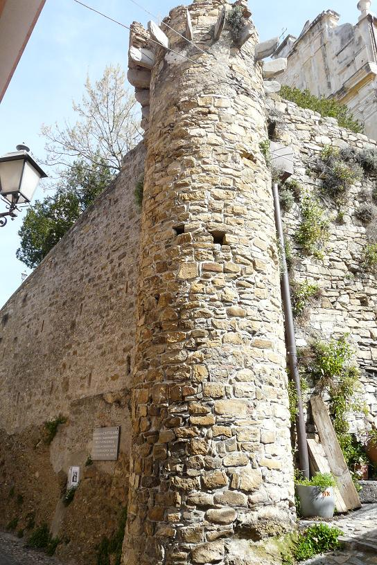 Foto varie del Castello di Castellaro, Liguria, Italia